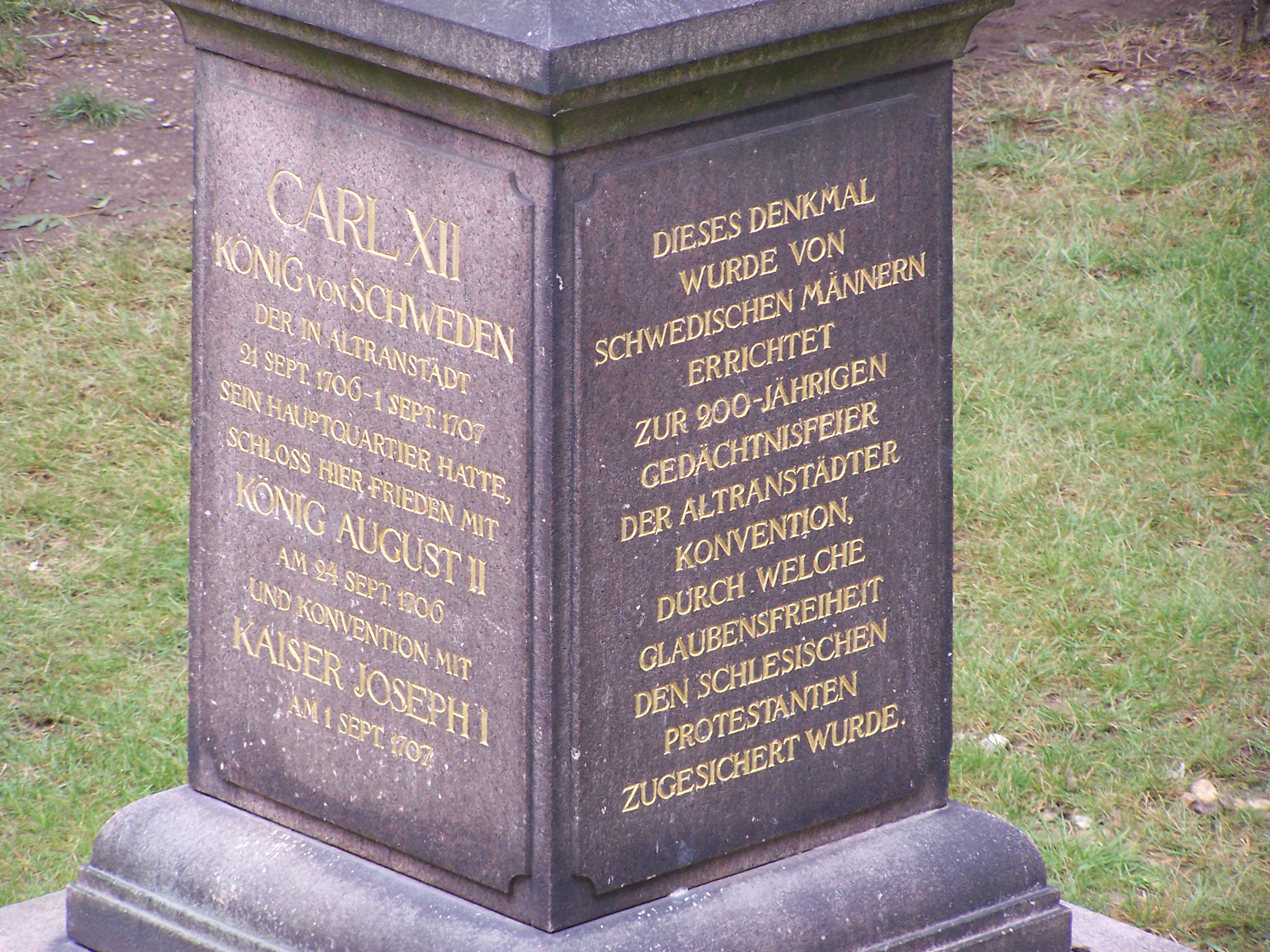 Denkmal im Hof des Schlosses Altranstädt, errichtet anlässlich der Altranstädter Konvention am 1. Sept. 1707